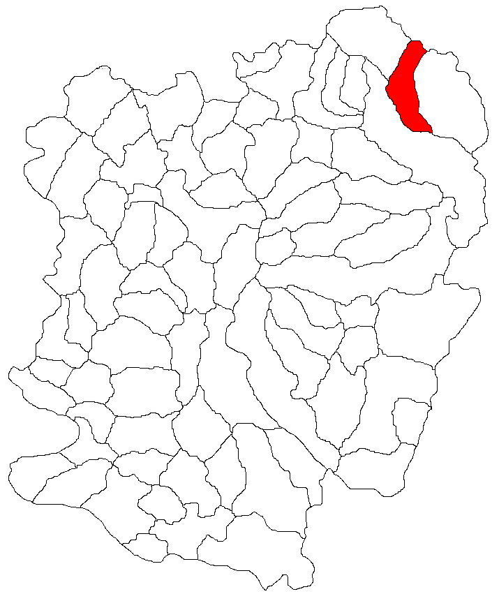 Categorie:Hărţi ale judeţului Caraş-Severin